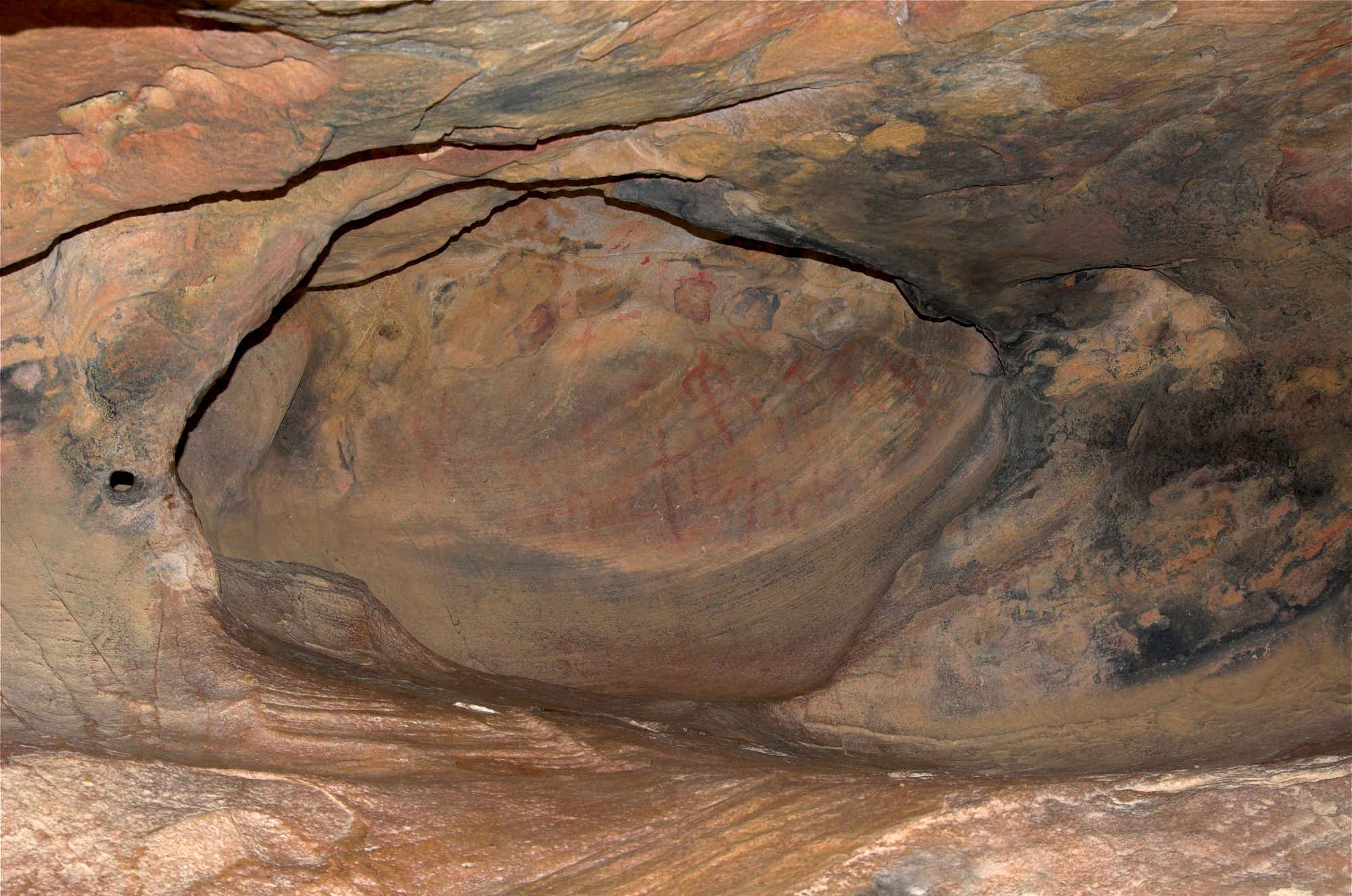 Pinturas rupestres de las Piedras de Cabrera (Casabermeja).